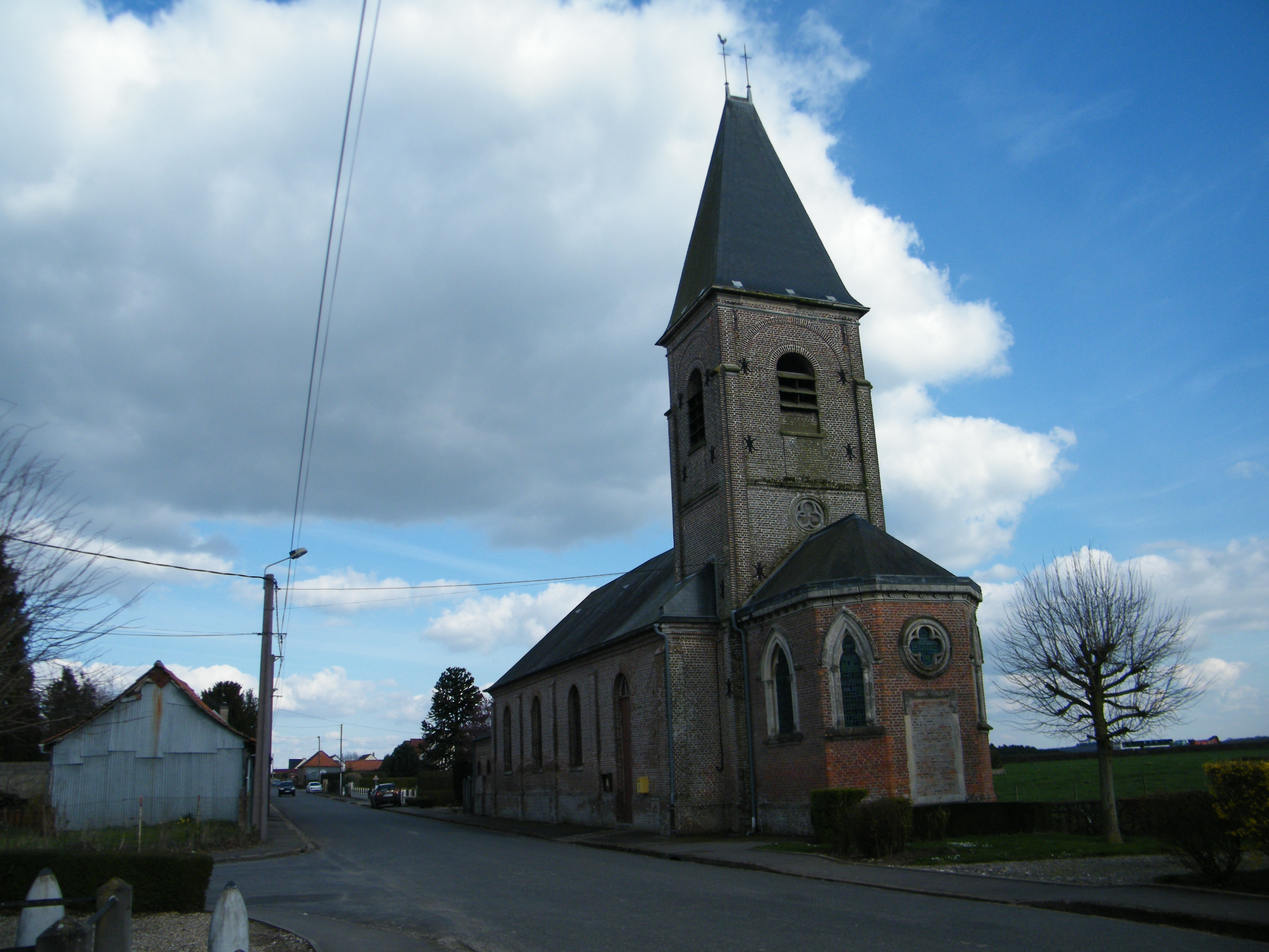 L'église.